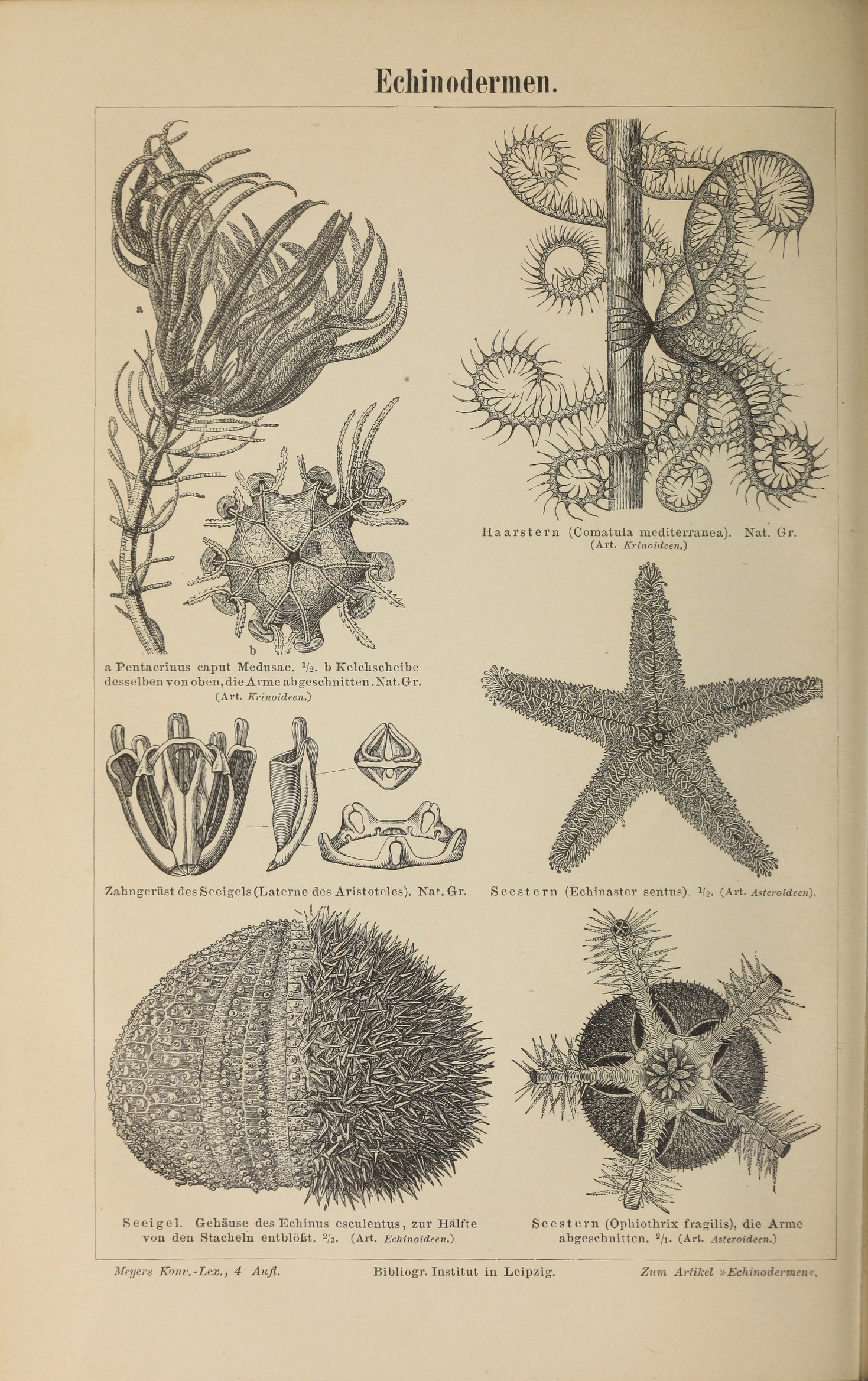 Bildtafel „Echinodermen“